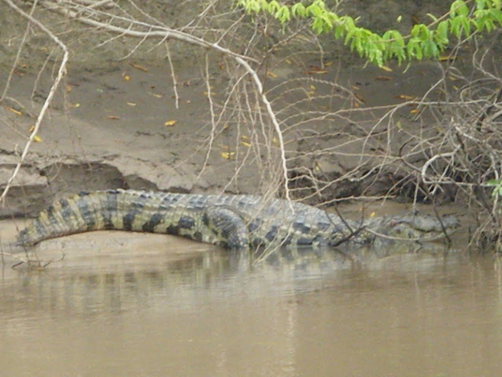 Caiman latirostris nas margens do rio Aguapeí.